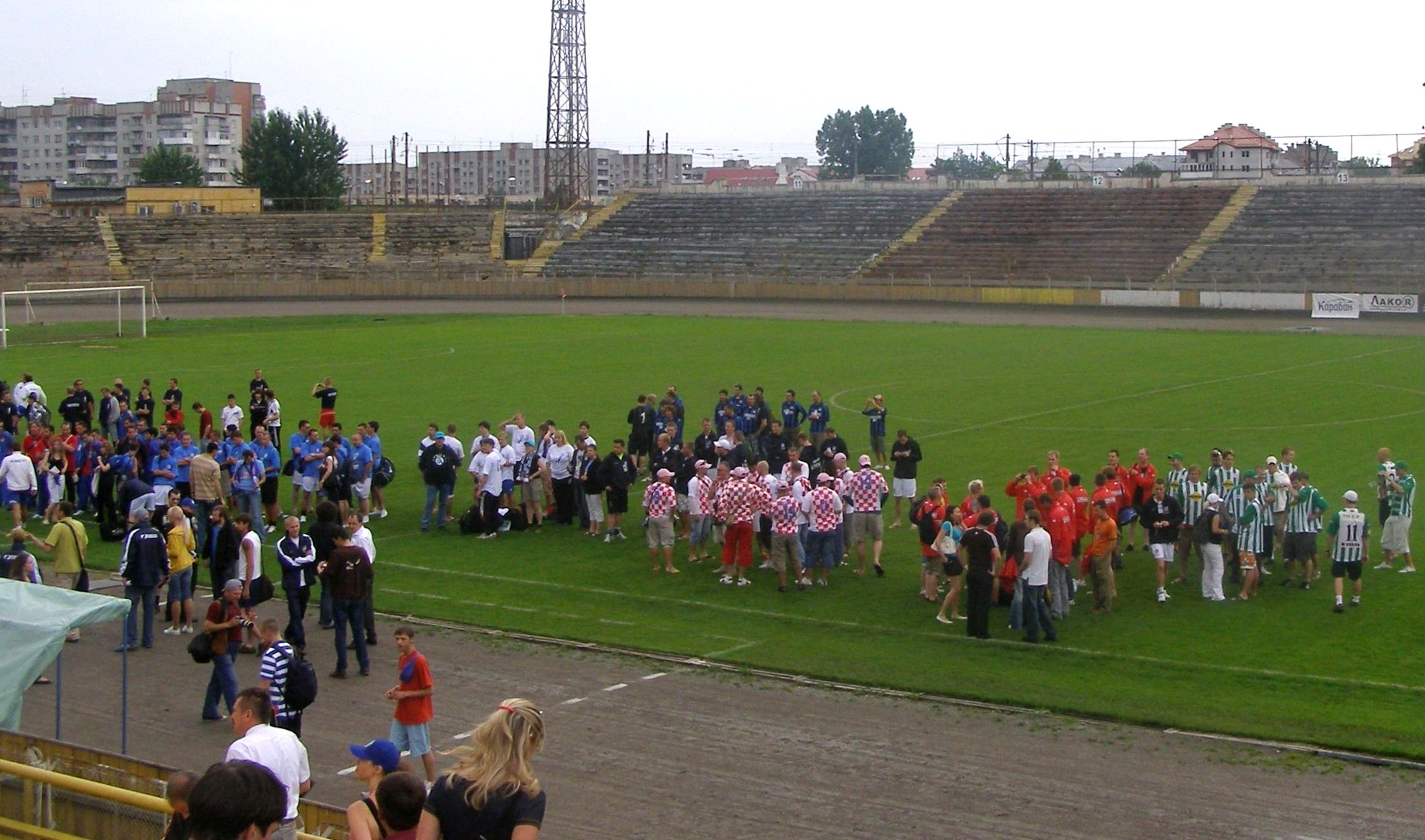 Die Öffnung des »Eurofan« Festivals - Festival für die Fußball-Fans